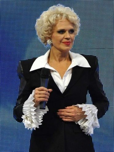 La presentadora de televisión Charytín.